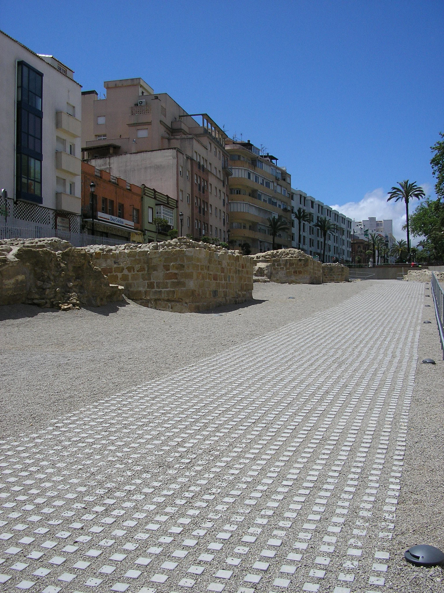 Vista del Parque arqueológico de las murallas meriníes de Algeciras, Andalucía, España. Se observan tres de las cuatro torres conservadas y el muro de argamasa de función desconocida que se situaba entre ellas. En el centro aparece el paseo peatonal habilitado tras la puesta en valor del yacimiento. Al fondo una de las entradas al parque y la Avenida Blas Infante.